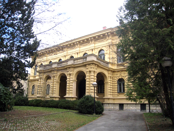 Stadtpalais Apfaltrem samt straßenseitiger Einfriedung